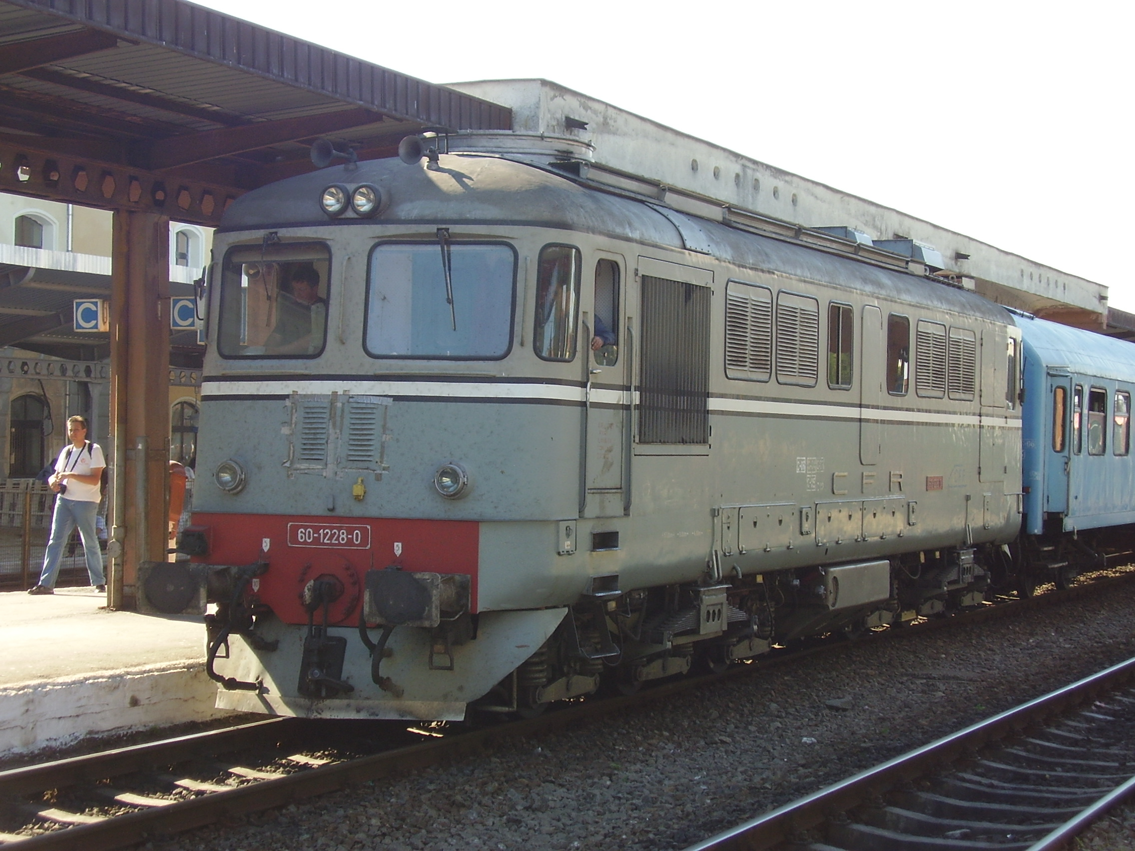 60-1228-0 Ã®n Gara Oradea. Foto: Dr2005.